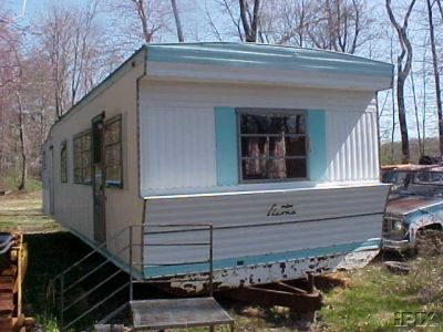 1967 Elcona Mobile Home